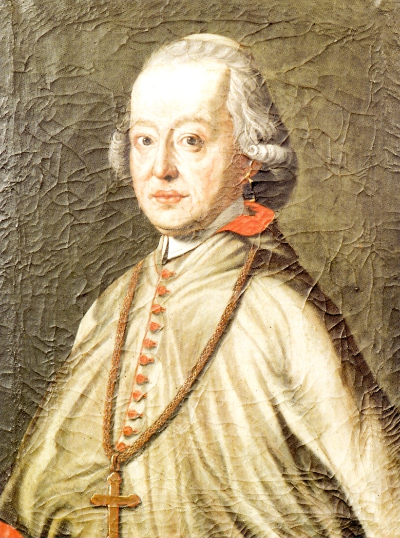 Ján Anton Révay (1748-1806), Bischof von Zips 1787-1806